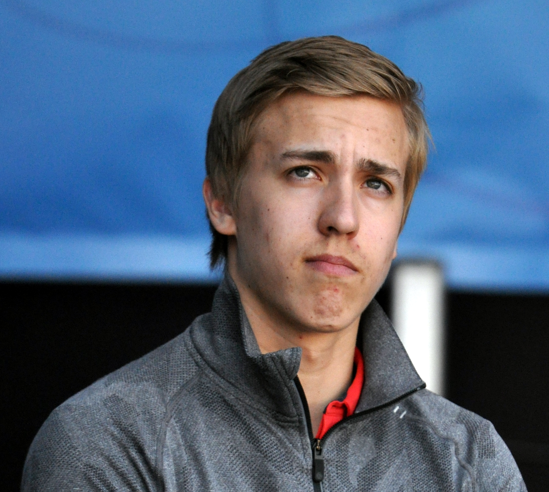 Teuvo Teräväinen Kiekkotorilla Sanomatalon edustalla.